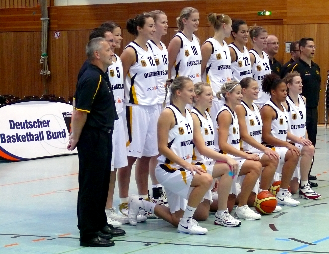 Deutsche Damen-Basketball-Nationalmannschaft